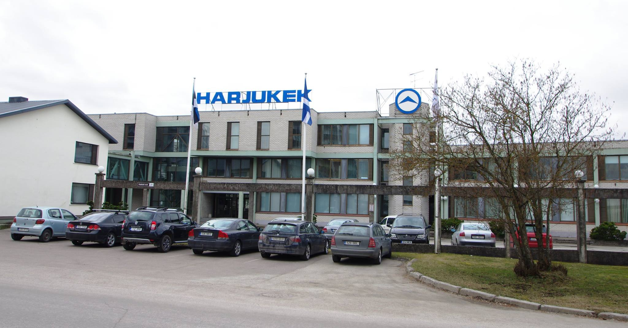 Harju KEKi peahoone